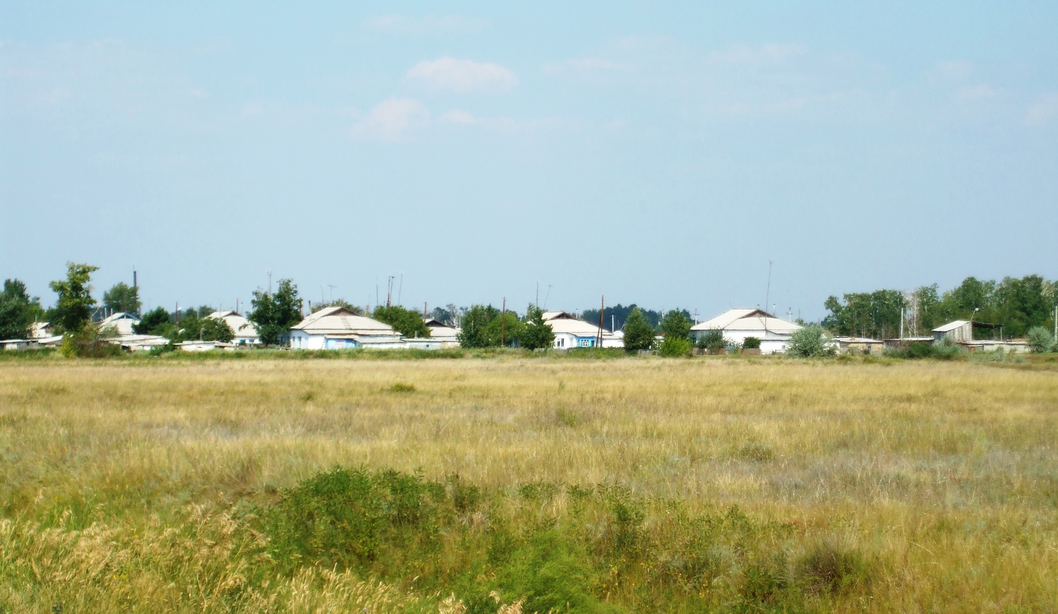 Южная окраина Новоивановки